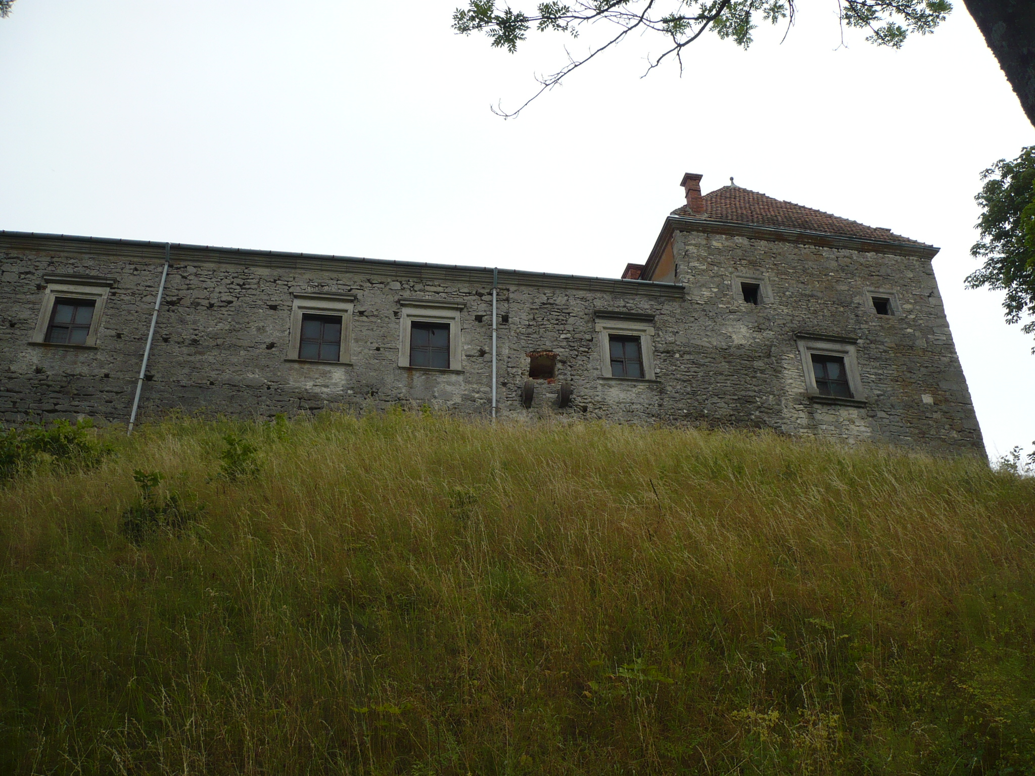 Tył zamku w Świrzu na Ukrainie. Zamek stanowił pierwotnie własność książąt Świrskich, od XVII wieku należał do rodu Cetnerów, zniszczony podczas wojen kozackich w 1648, zdobyty przez Turków w 1672. Po pierwszym rozbiorze Rzeczypospolitej znalazł się na obszarze zaboru austriackiego. Ostatnimi właścicielami przed 1939 byli Irena z Lamezanów i jej mąż Tadeusz Komorowski, późniejszy dowódca Armii Krajowej i powstania warszawskiego